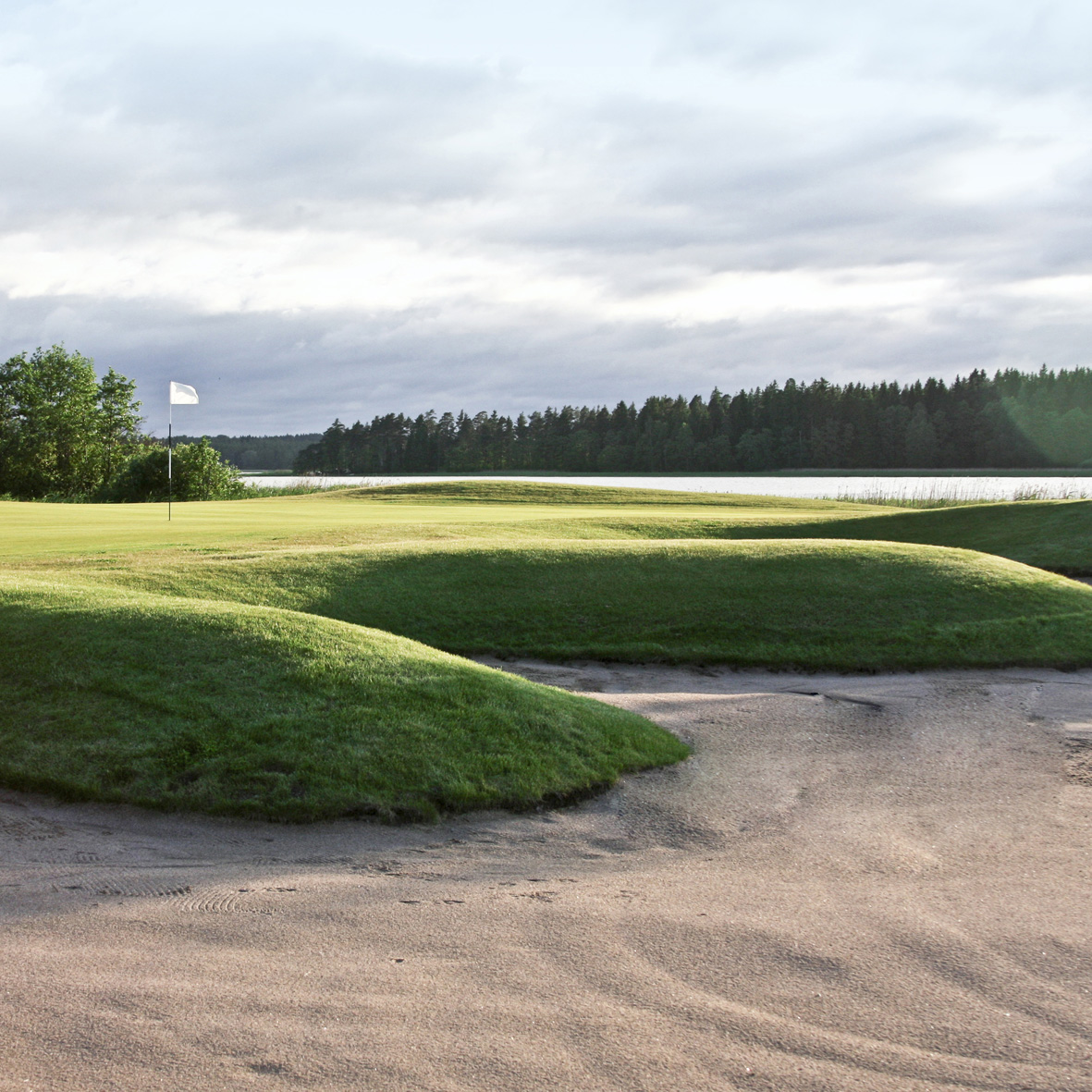 Kuva Freamin väylästä 2.